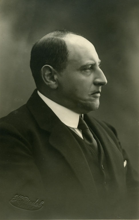 Siegfried Walter Loewe, saksa arstiteadlane ja farmakoloog